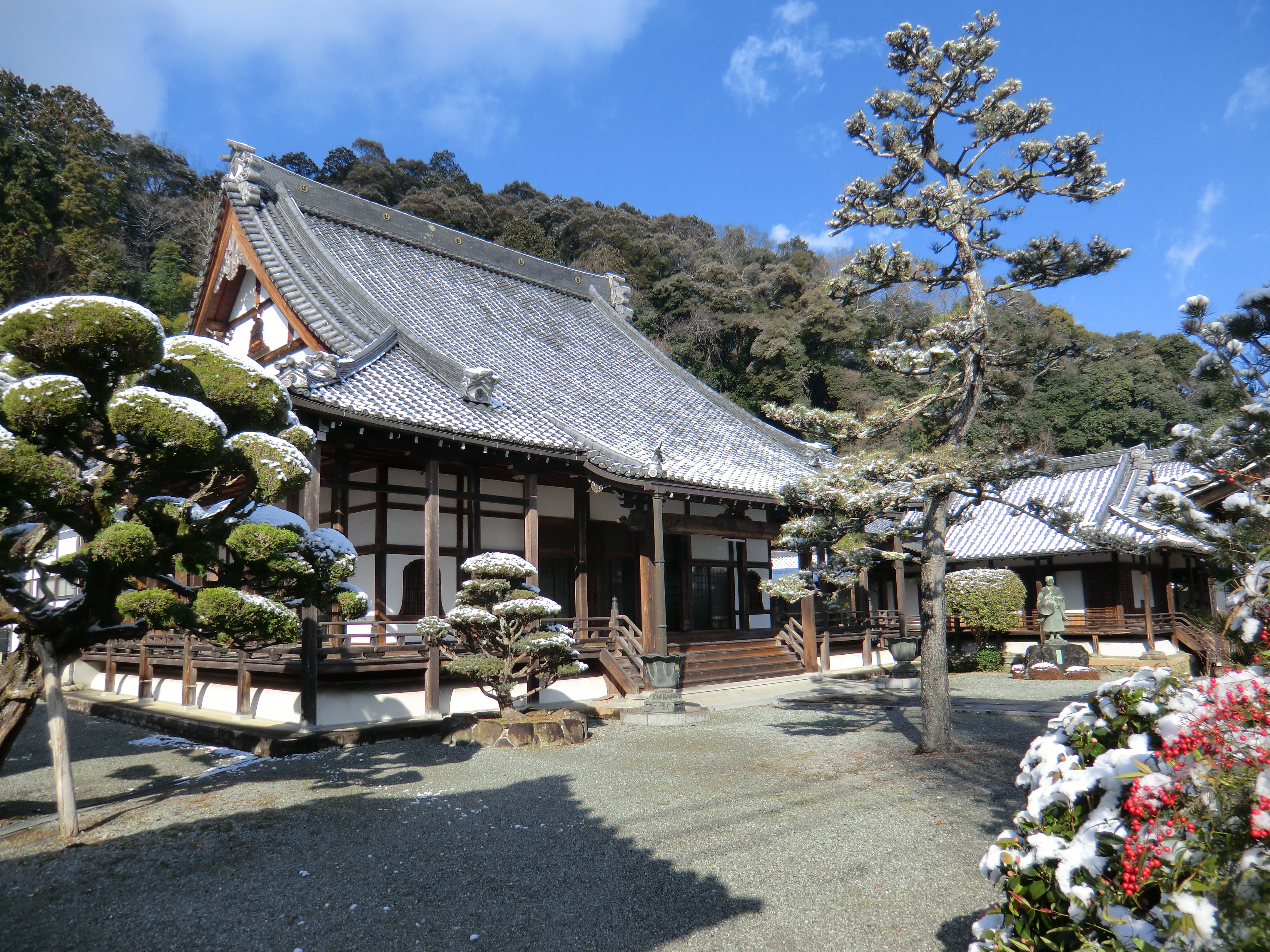 願行寺 (奈良県下市町) 2018年2月